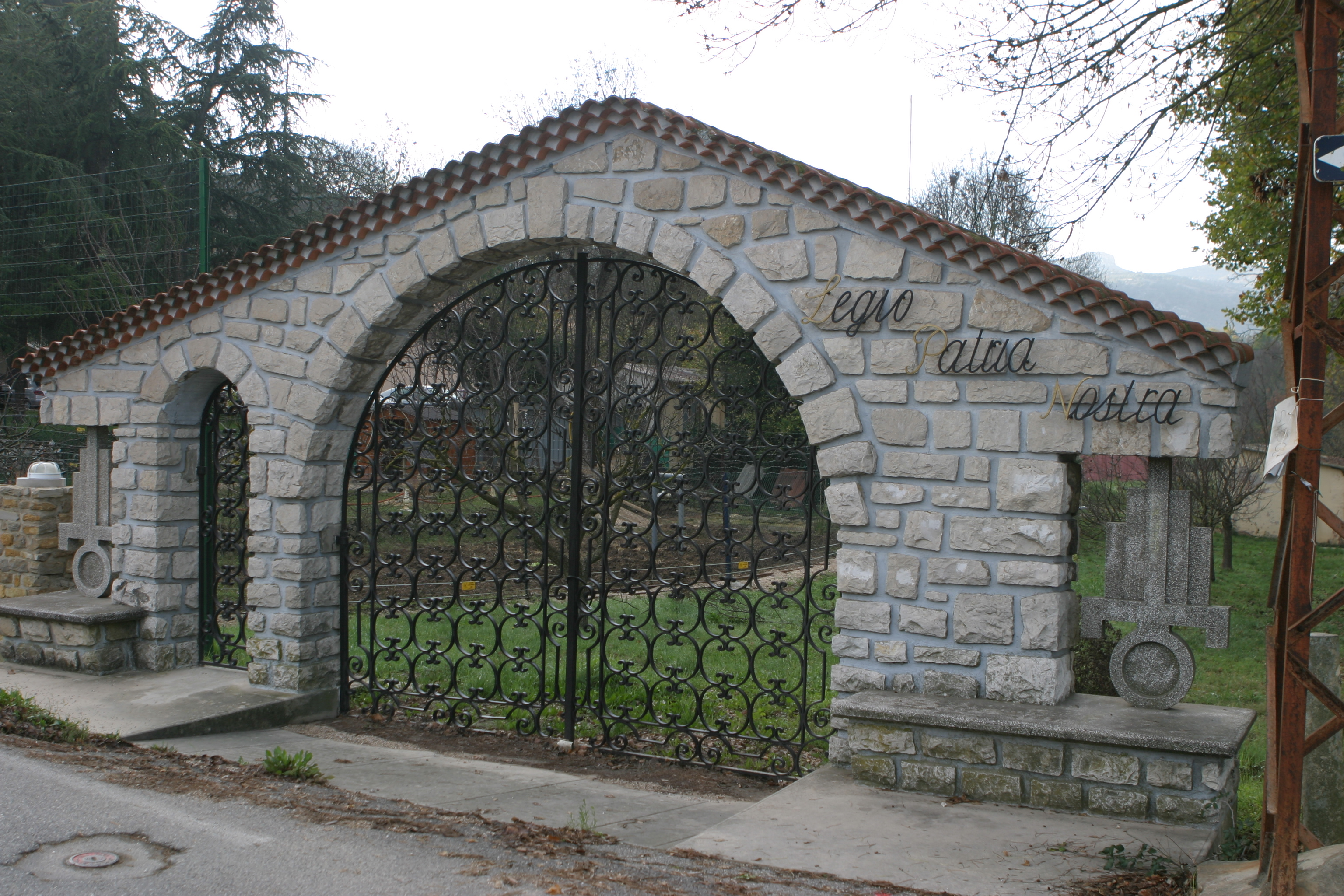 Portail de la Maison du Légionnaire à Auriol (13 - France)